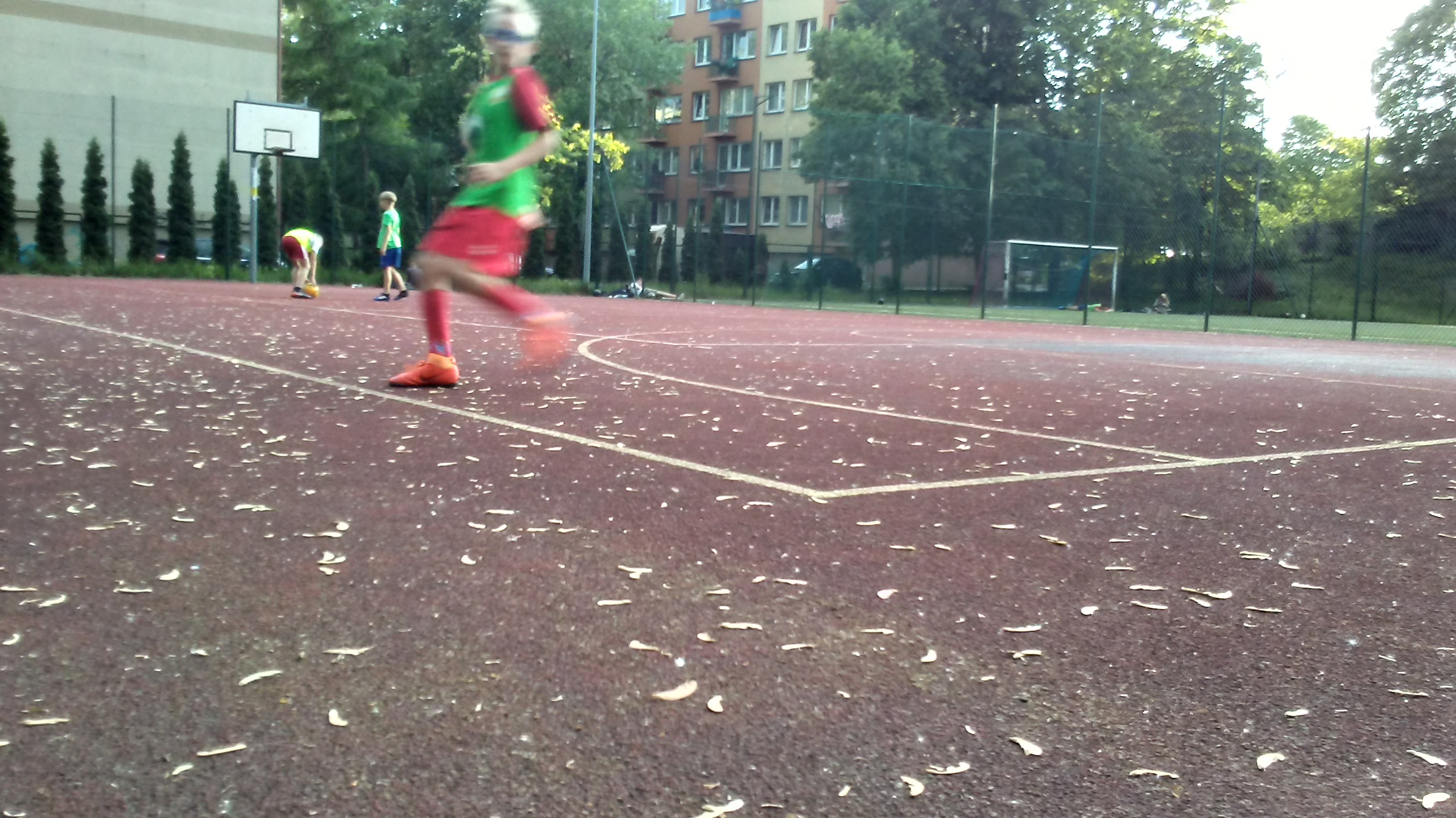 Fotografia przedstawia boisko do gry w koszykówkę przy II Liceum Ogólnokształcącym w Tomaszowie Mazowieckim w województwie łódzkim.